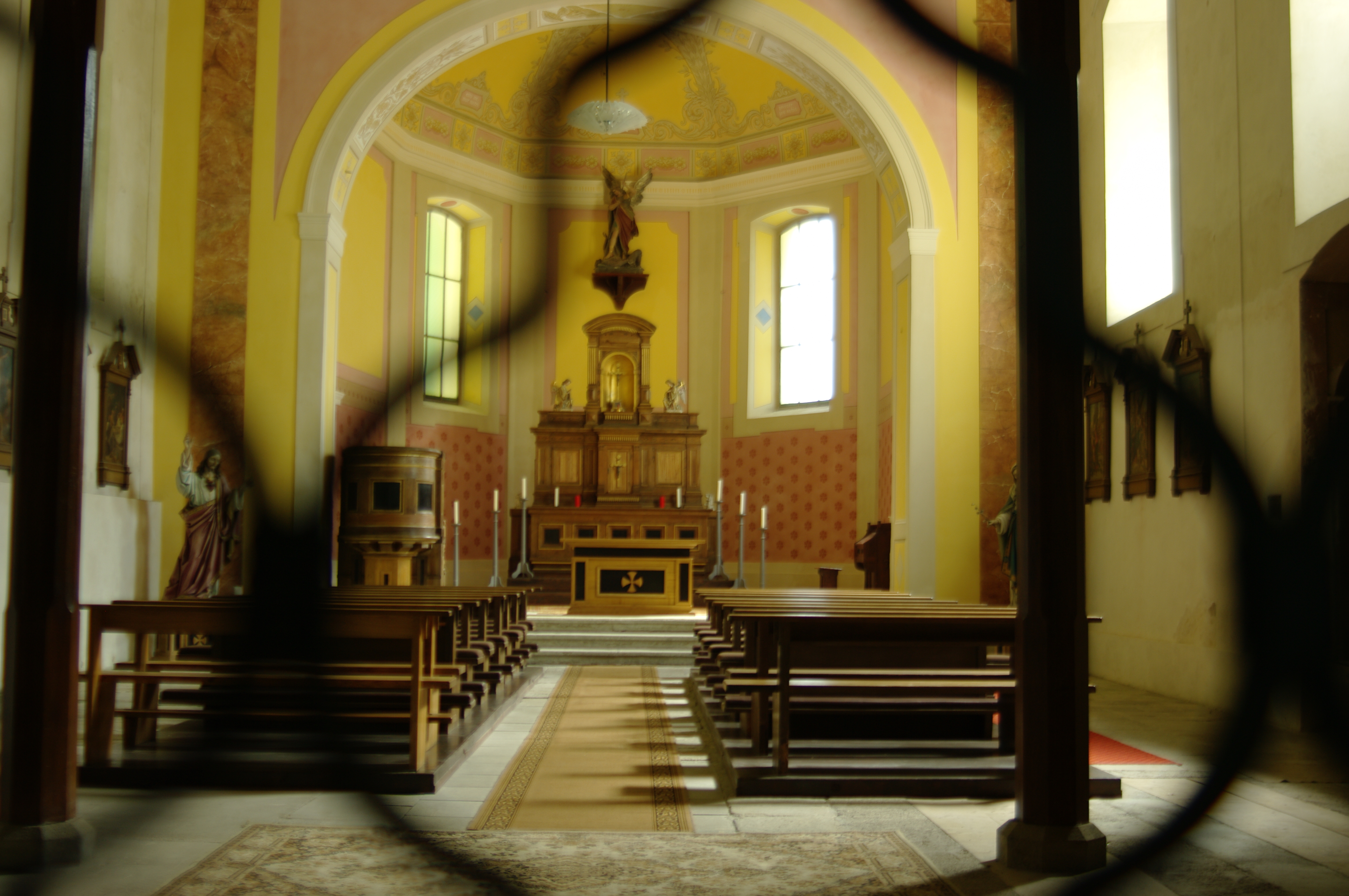 kostel na andelské hoře